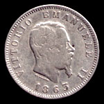 1 lira 1863 front (c) Pietro